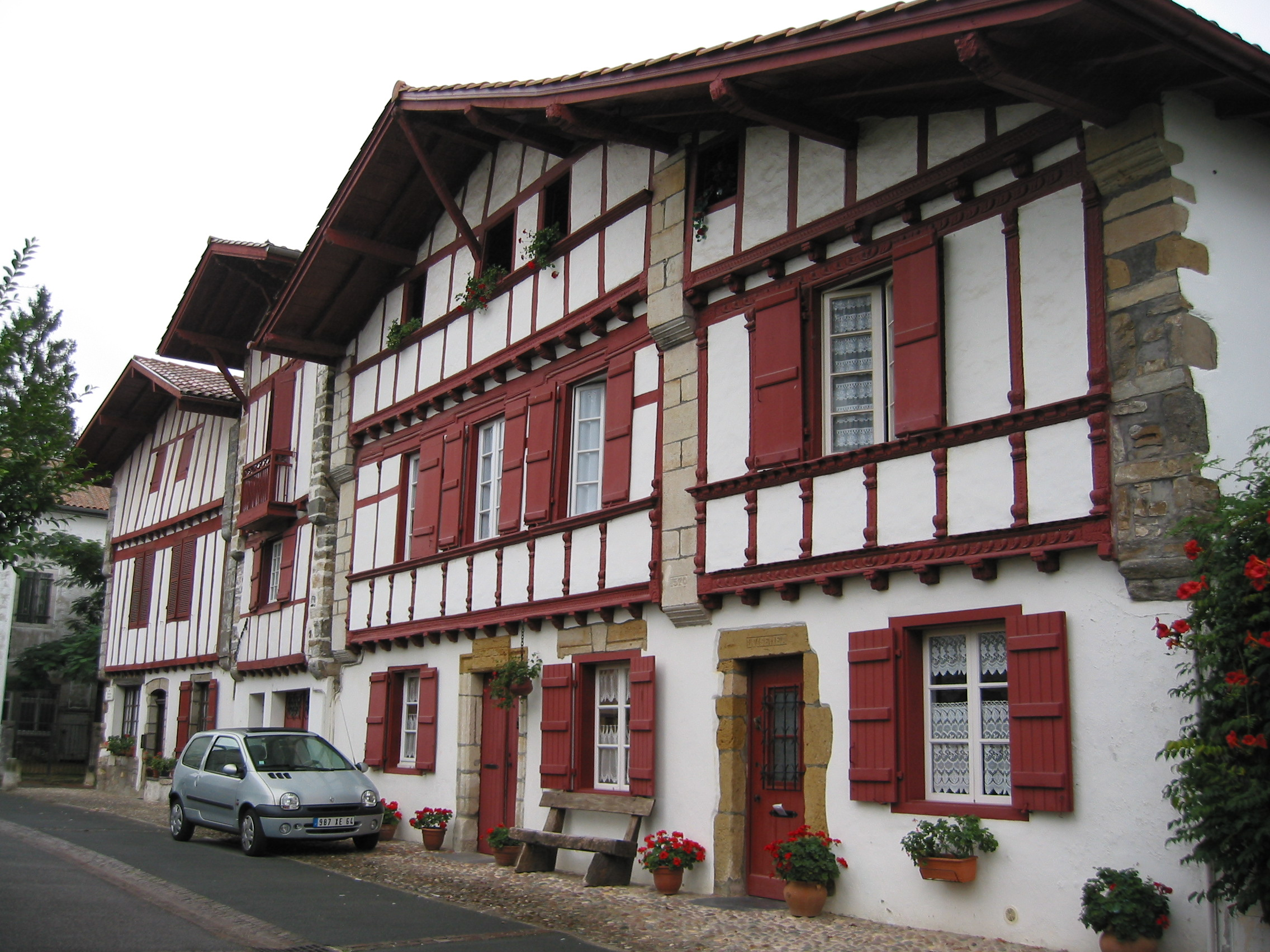 Ustaritz (France) le village. Photo prise le 14/09/04 par Harrieta171